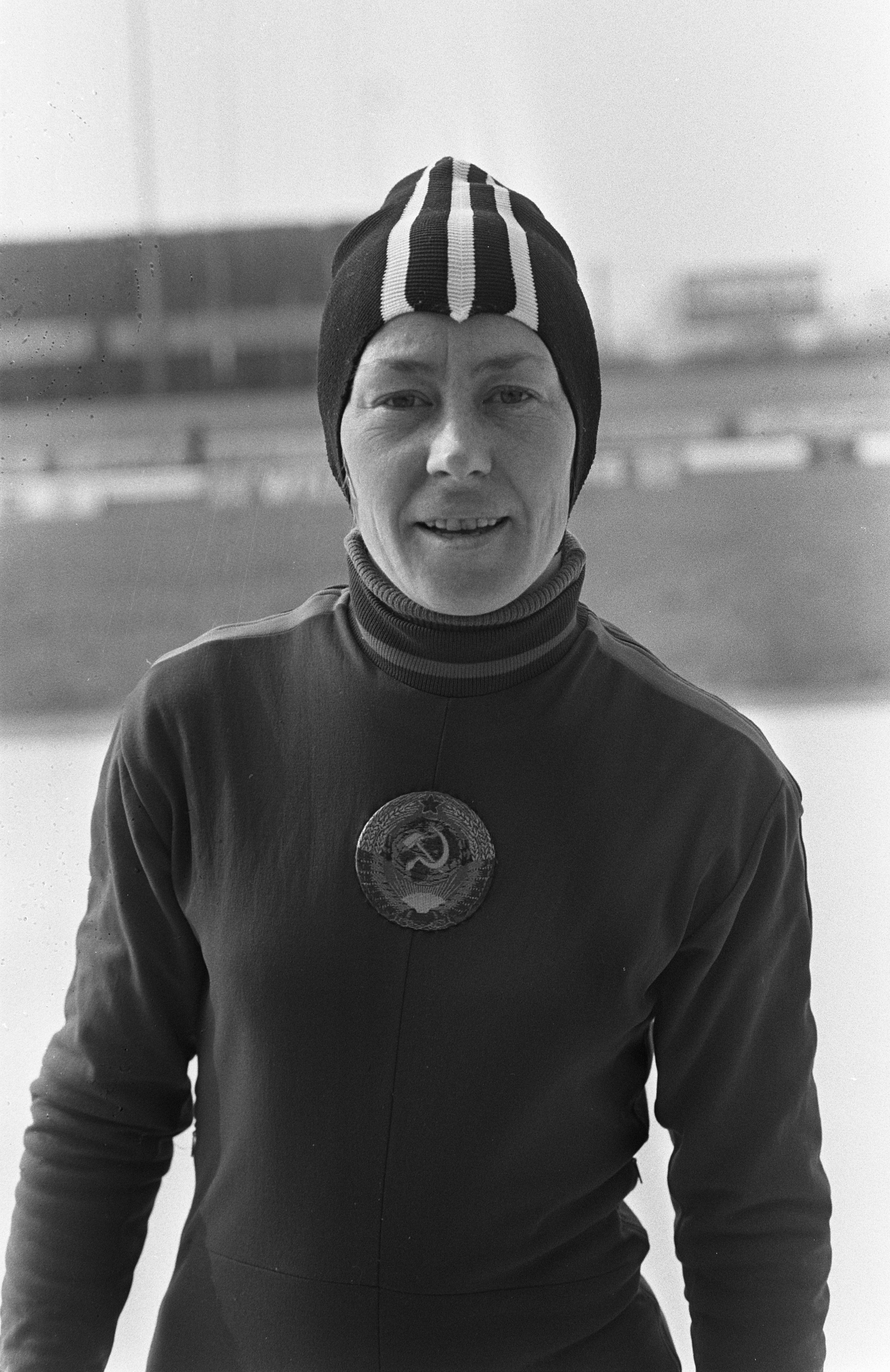 Training wereldkampioenschappen schaatsen dames in Heerenveen. Nina Statkevitsj (Sovjet-Unie)